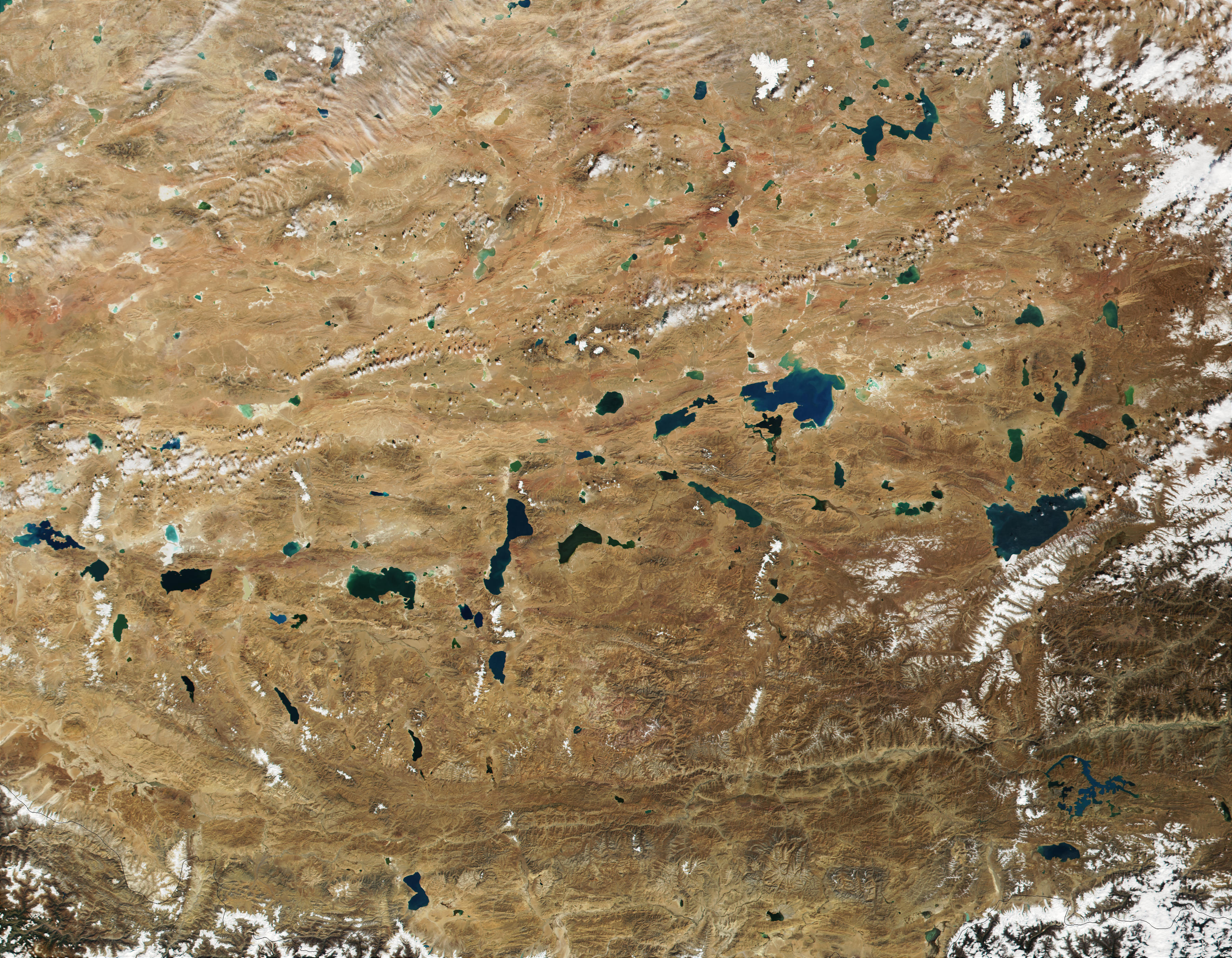 Tibet, satellite image from Terra / MODIS.